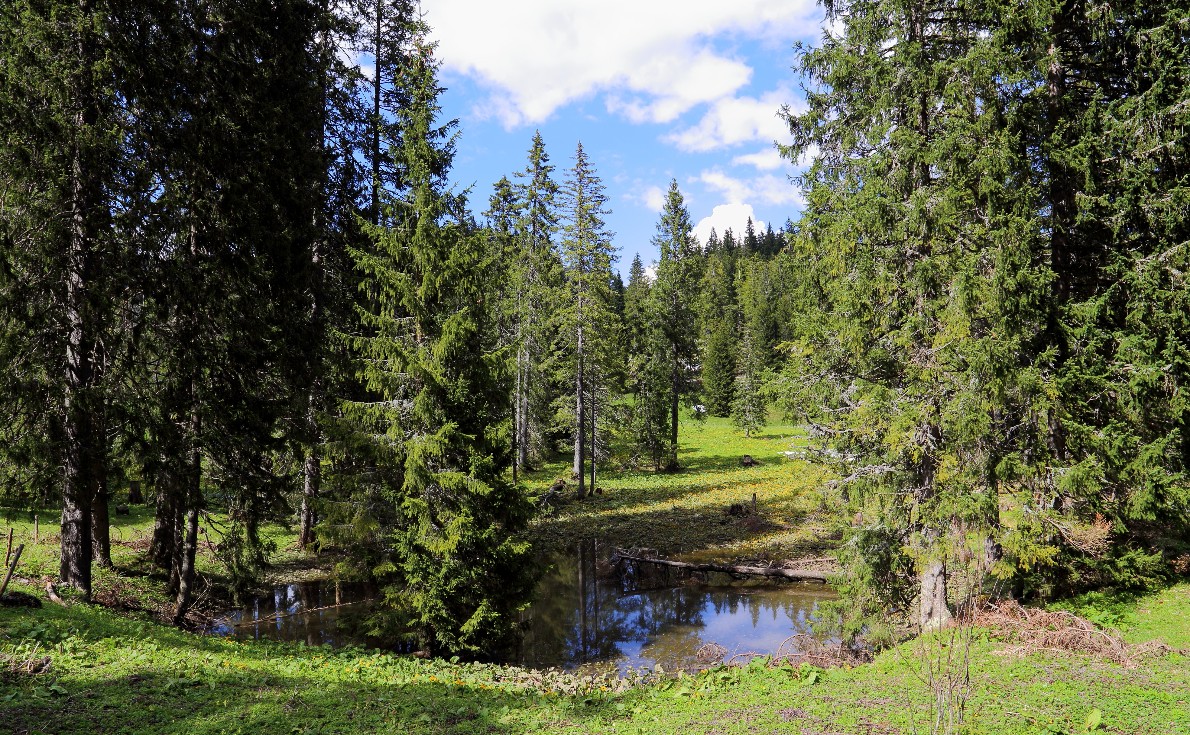 Typische Landschaft mit Tümpel im Naturpark Mürzer Oberland. This file shows the Nature Park with the ID 6410 in Austria.